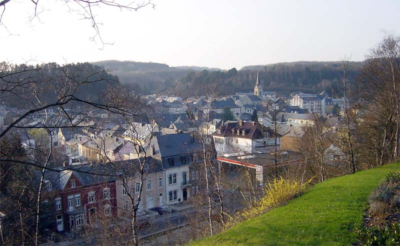 Stad Rëmeleng, vum Stadpark op Kolscheed aus gesinn.